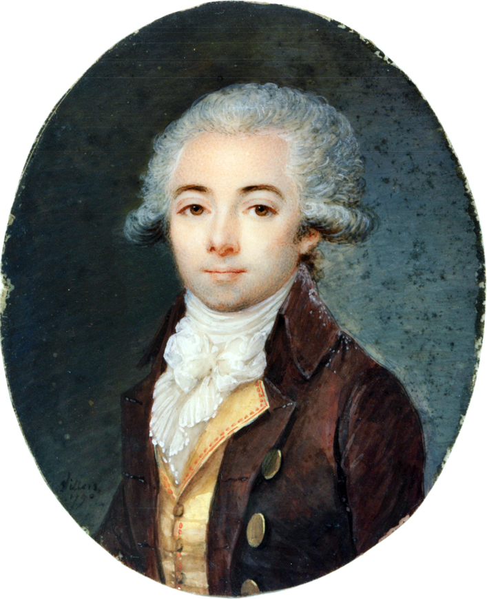 Antoine-VIII-duc-de-Guiche